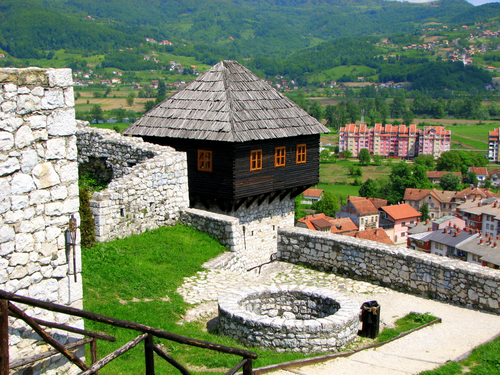 Градина. Аутор: Бранко Д. Тодоровић